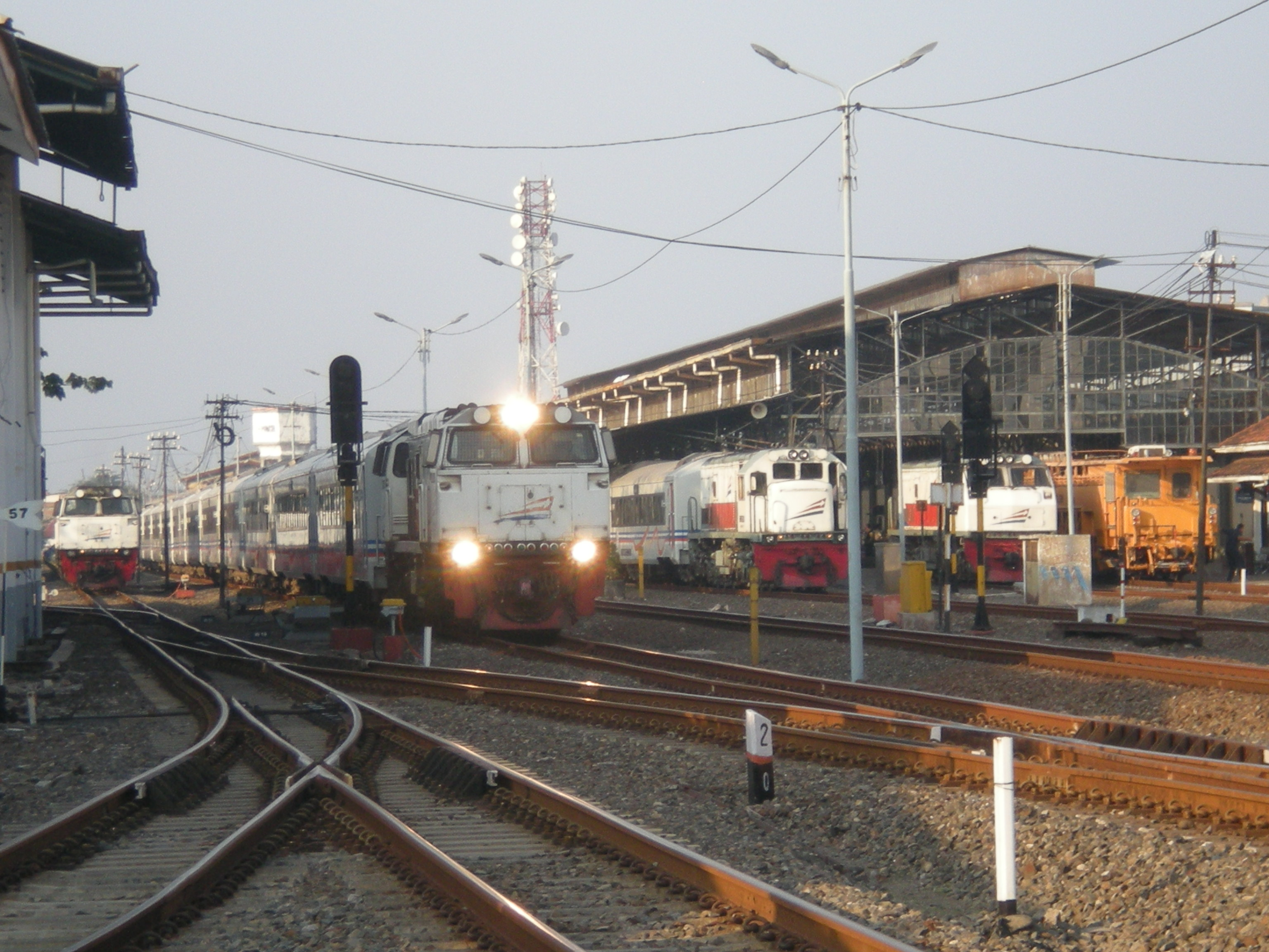 Stasiun Semarang Poncol disaat Padat, dengan Jalur 1 TMC, Jalur 2 CC 203, Jalur 3 KA Kaligung, dan Jalur 5 Melintas Langsung KA Argo Muria.